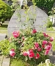 Brigitte Ratz-Marothy:Döblinger Friedhof (23-8-8)